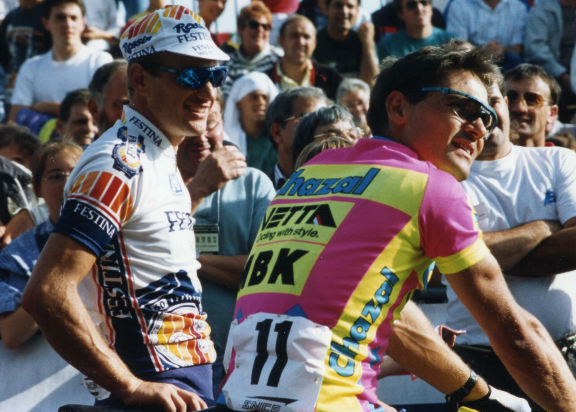 CRITERIUM DE LEVES